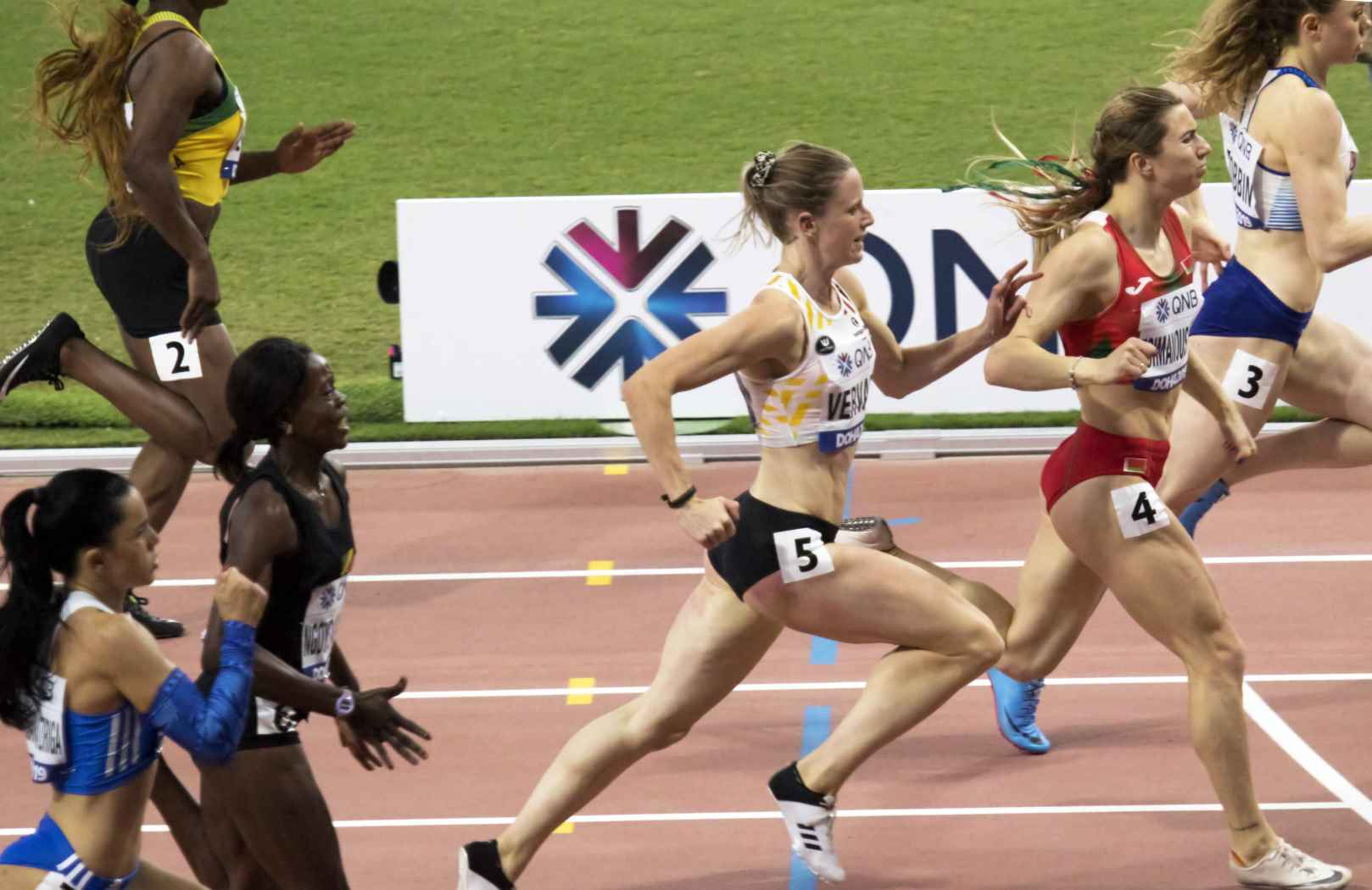 DOH40026 200m women heats vervaet